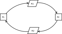 circular wait